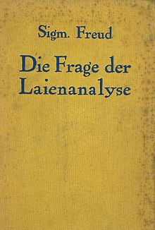 Copertina del libro di Freud "Sulla questione dell'analili laica" del 1926 edizione tedesca